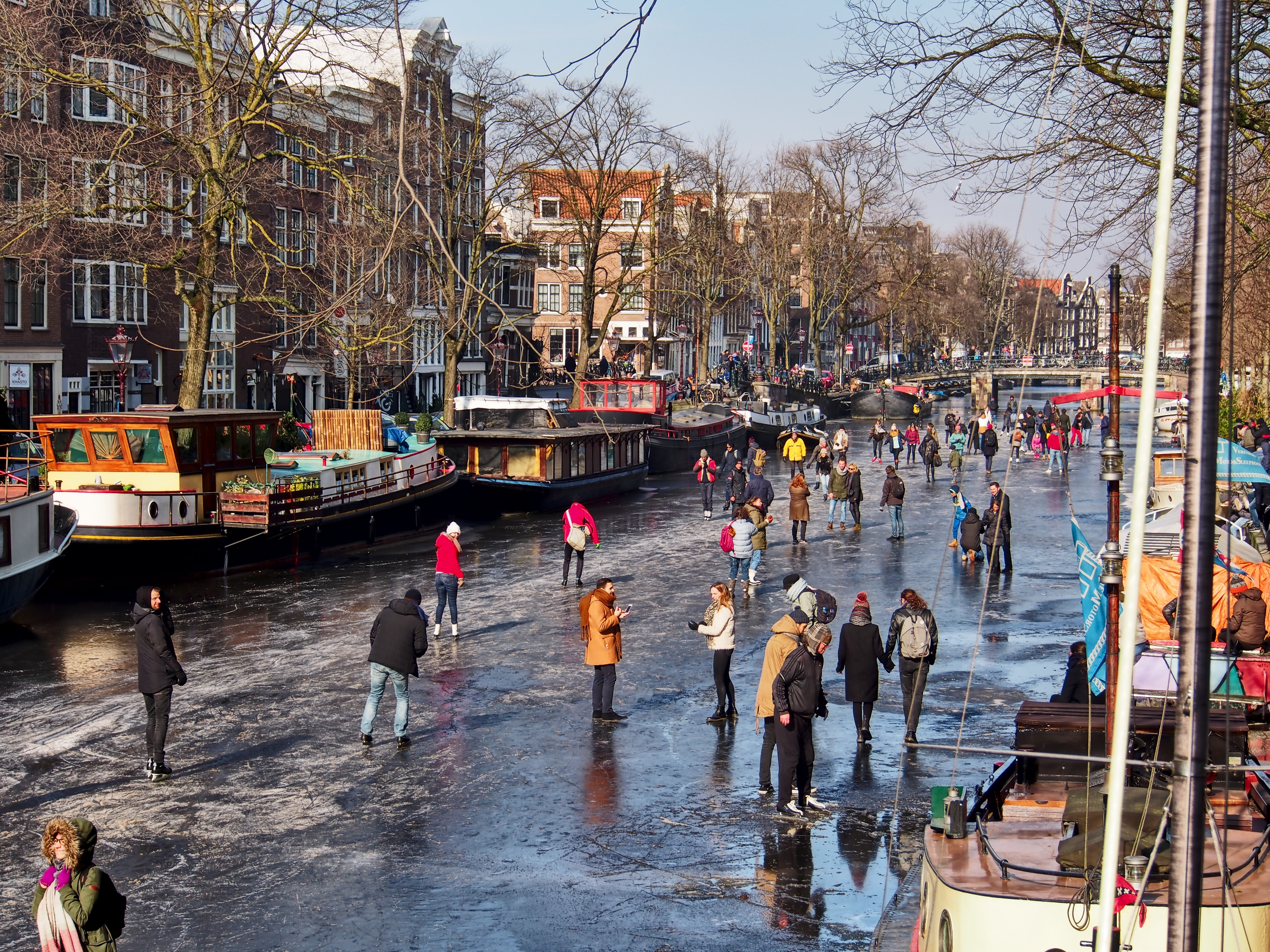 Schaatsen op de Prinsengracht in Amsterdam.